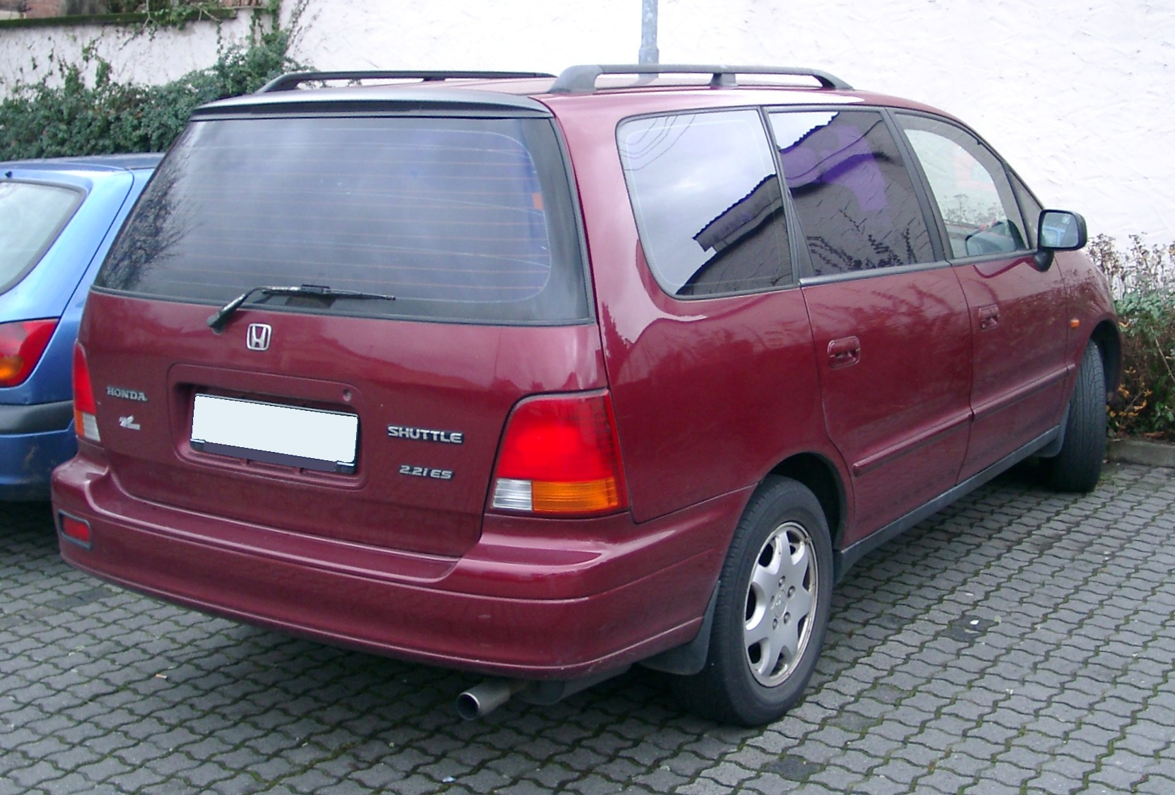 Honda Shuttle